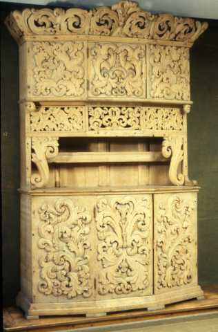 Framskap skåret av Skjåk-Ola